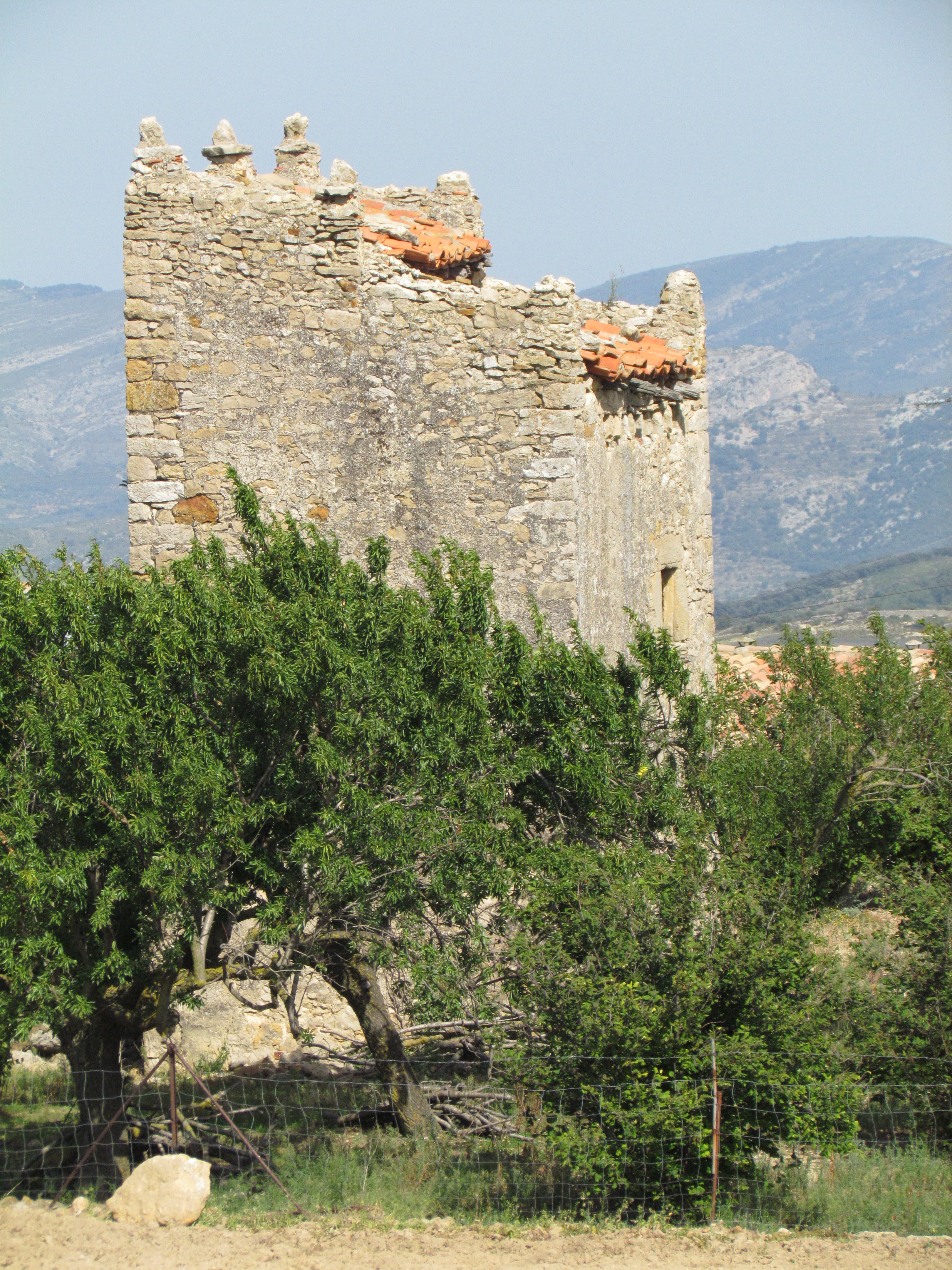 Torre del Palomar de Culla, Alt Maesterat (País Valencià)